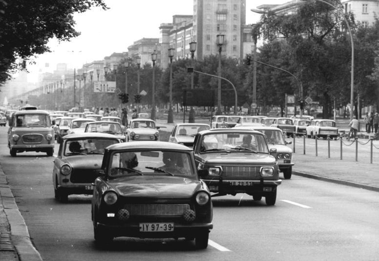 ADN-Zentralbild Link 12.8.82 Berlin: Reger Verkehr auf den Straßen der Hauptstadt. Hier ein Blick in die Karl-Marx-Allee.